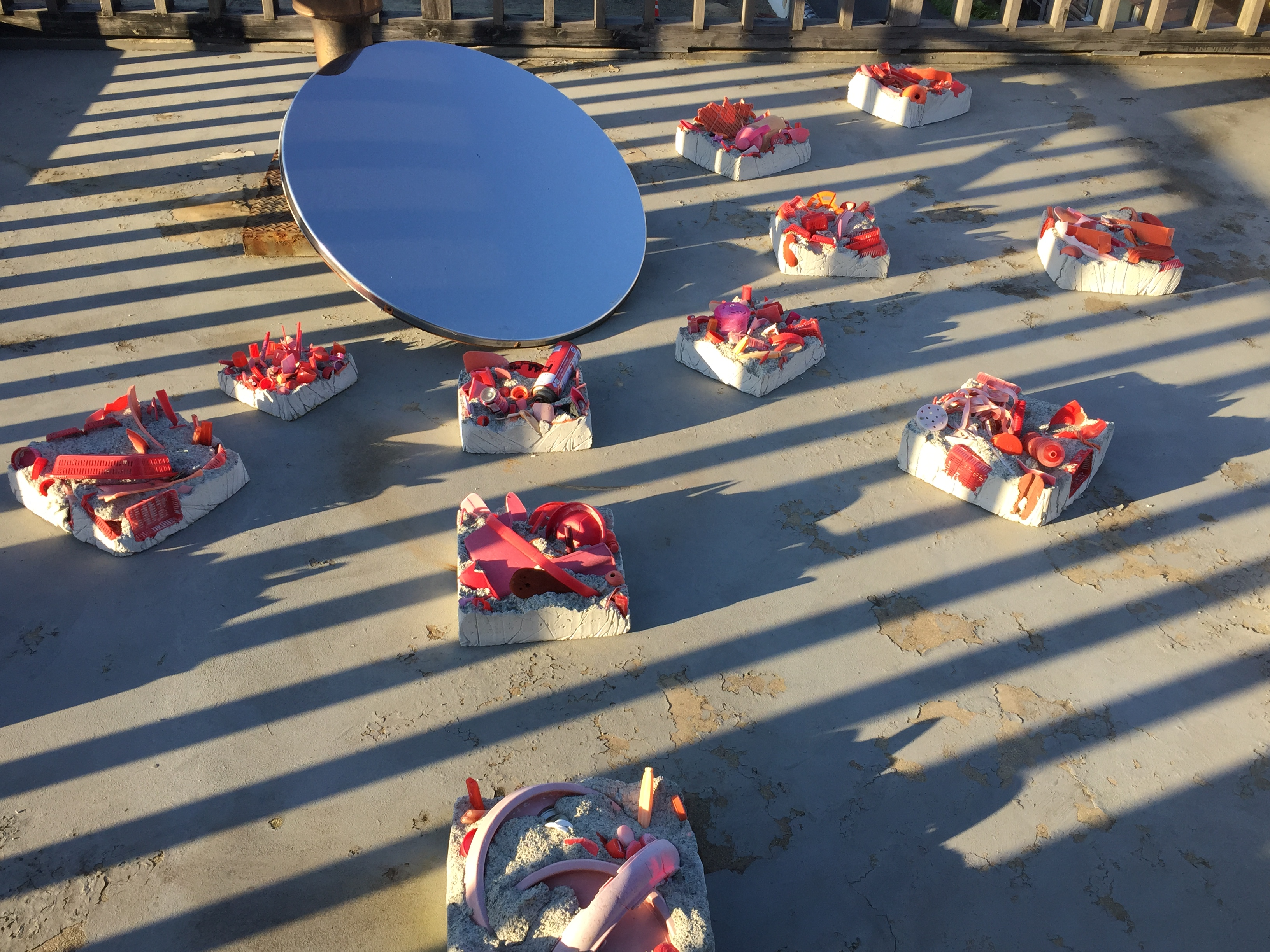 京丹後市網野町の夕日ケ浦海岸でビーチコーミングをして、赤色の漂着物ばかりを集めて、コンクリートで固め、華が咲いたようにヒカリ美術館の屋上に並べたもの。丹後の「丹」の丹色にちなんだ作品である。2015年9月20日～10月12日の「大地は器2015」に展示され、その後2018年まで展示されていた。